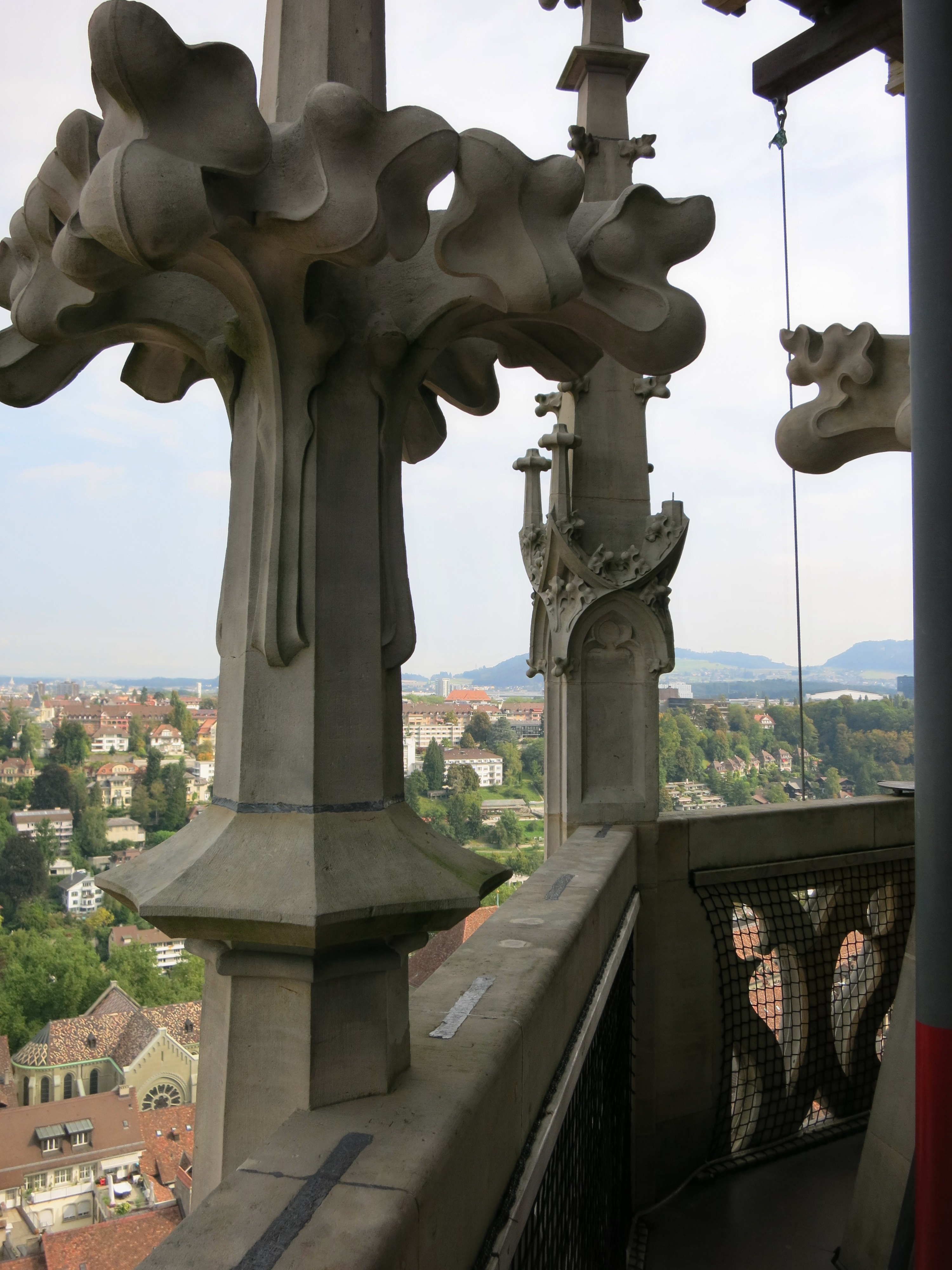 Obere Aussichtsplattform des Berner Münsters